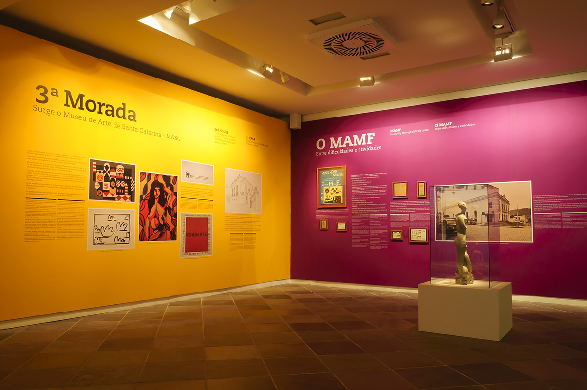 MASC: Tempo, espaço e arte.